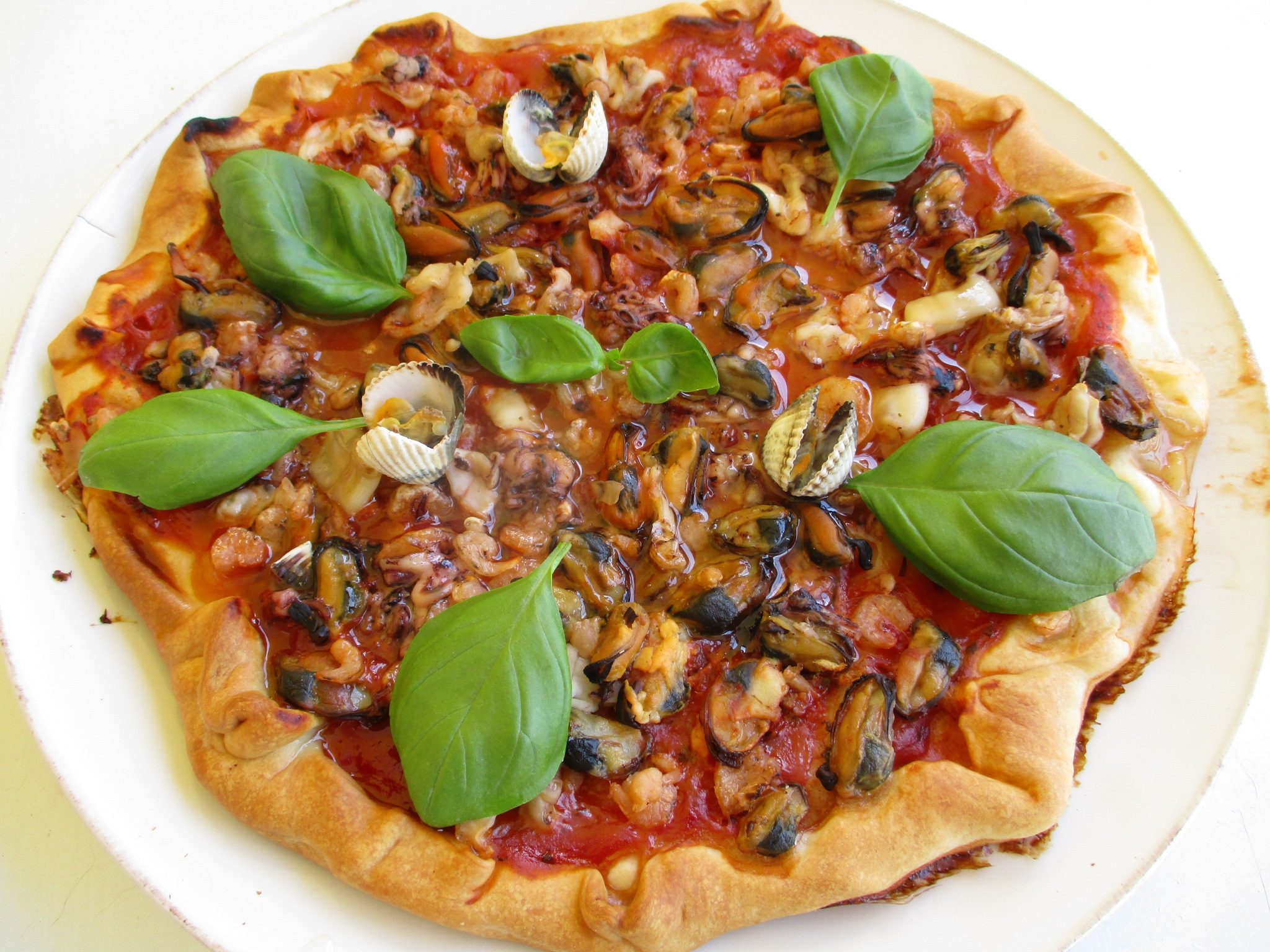 Pizza del mare